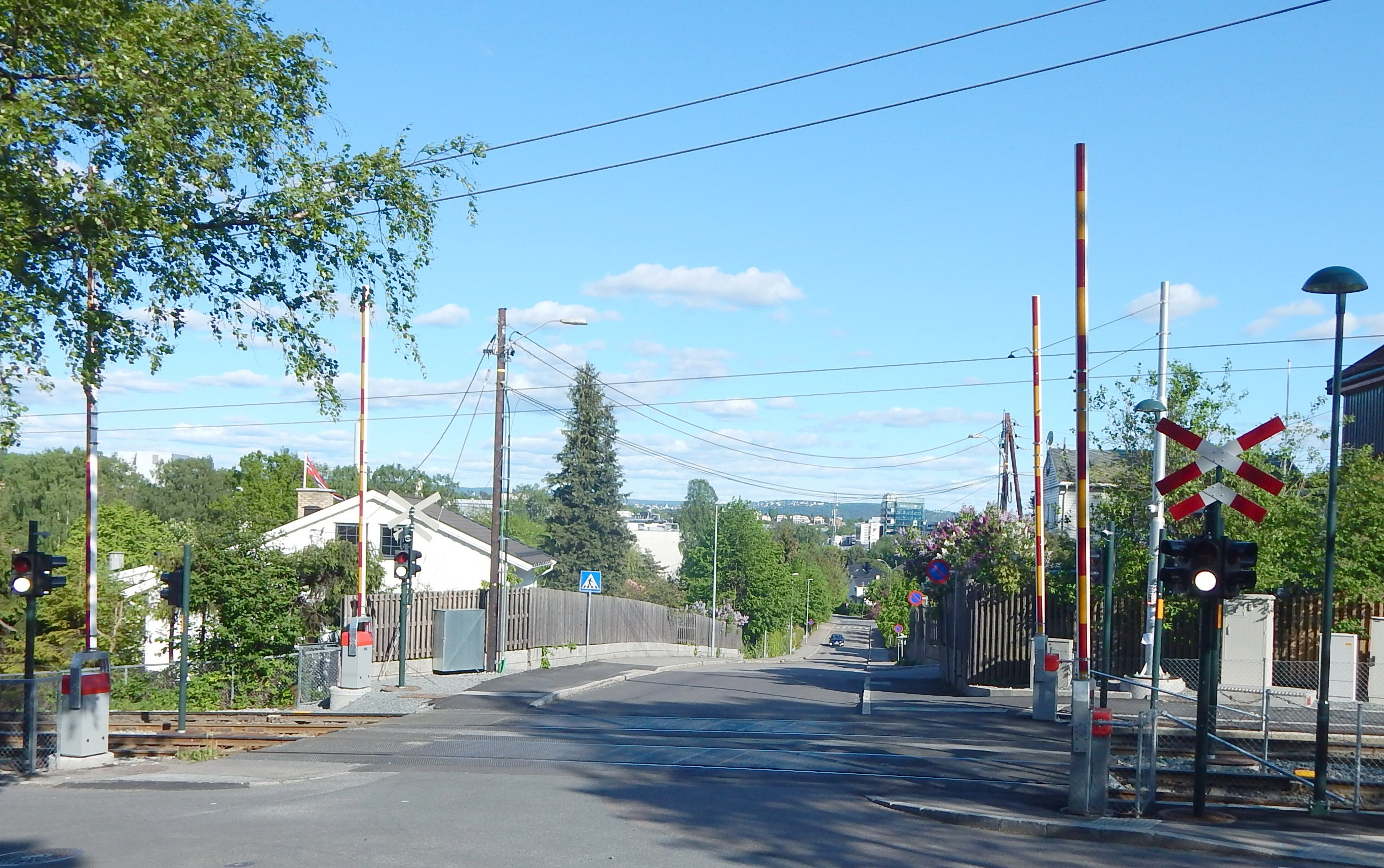 Harbitzalleen